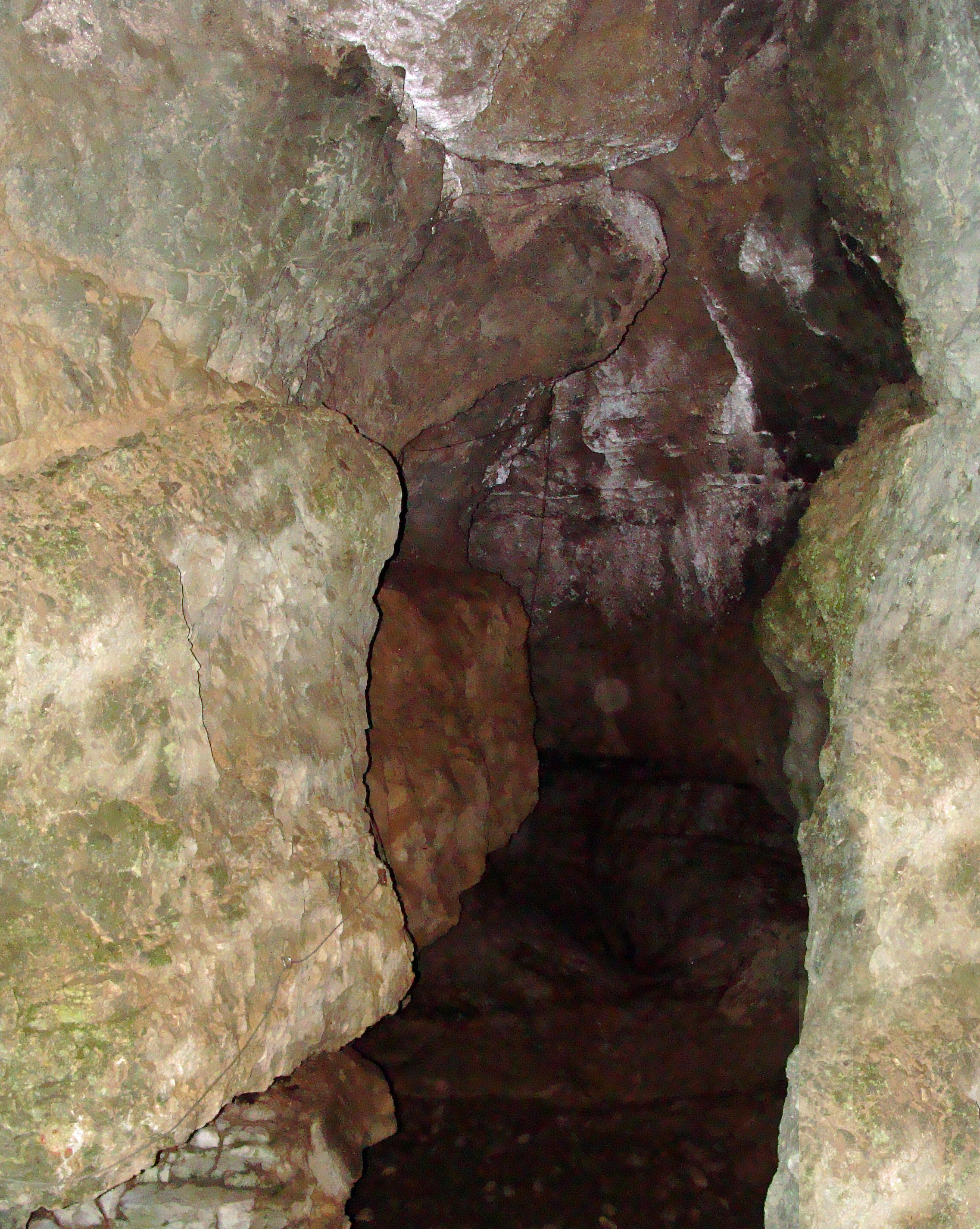 Abîme de Vigant, Borgo Vigant (commune de Nimis), Frioul-Vénétie julienne (Italie)